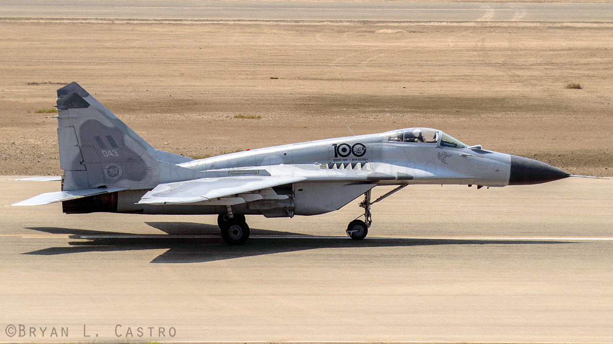 Mikoyan MiG-29SM-P rodando sobre la pista de aterrizaje de la Base Aerea Las Palmas en Lima. Fuerza Aérea del Perú.